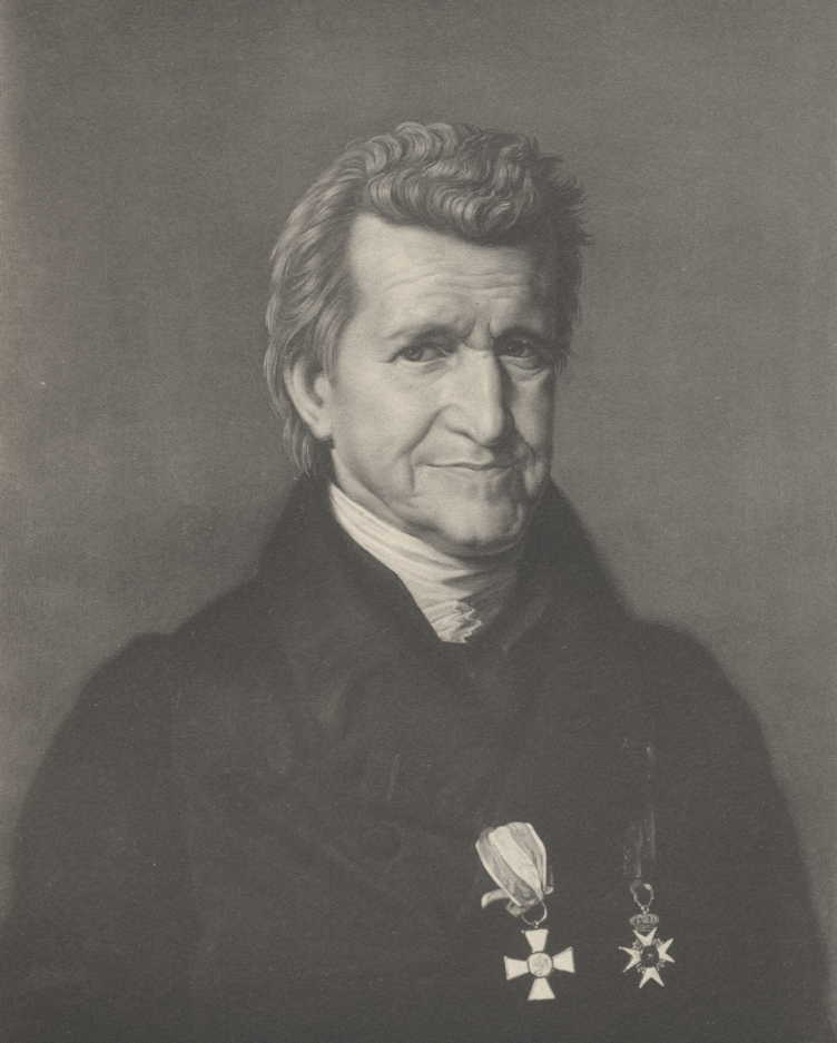 Bildnis von Christian Ehrenfried von Weigel